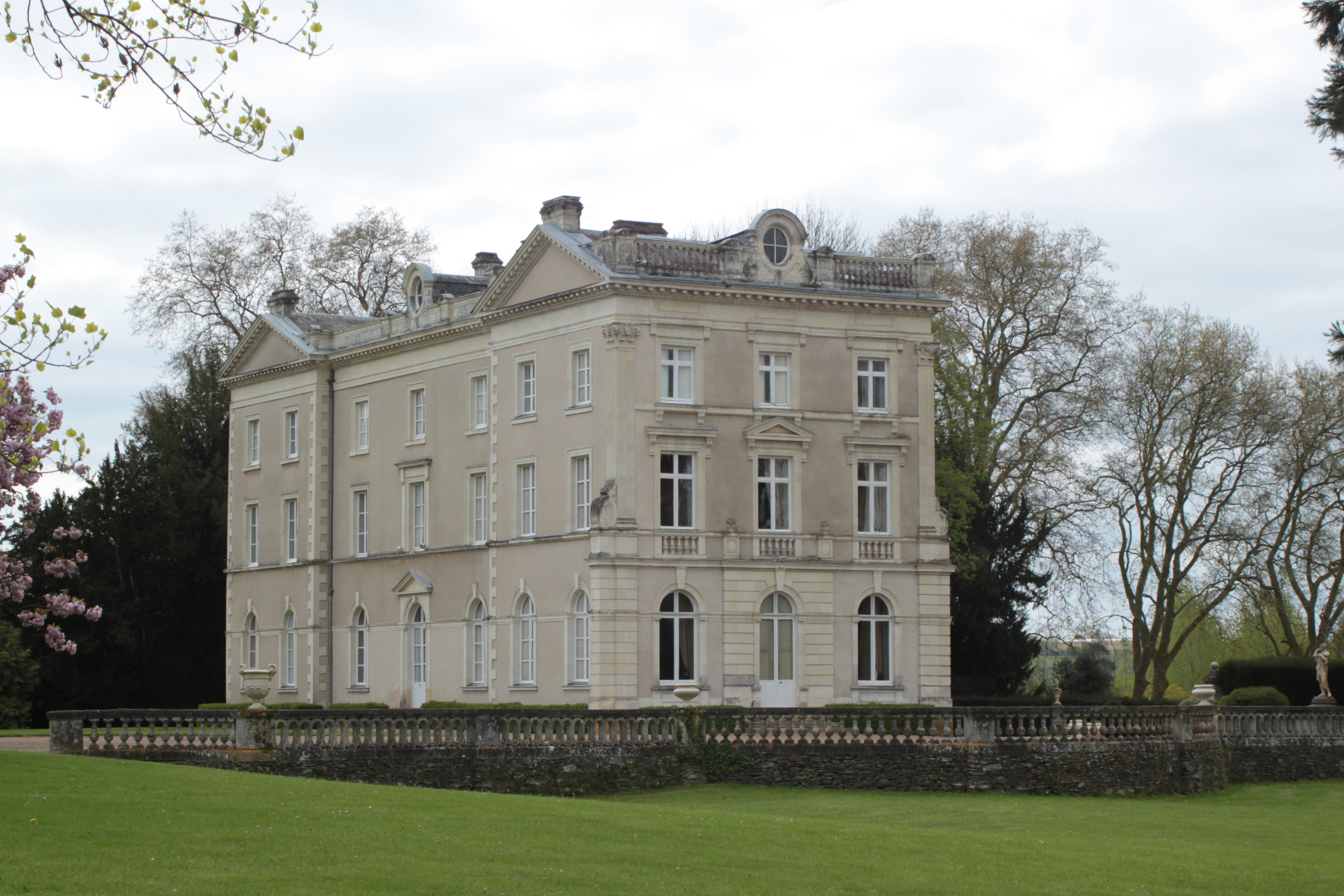 Château du Bas-Plessis, XIX°, Fr-49-Chaudron-en-Mauges.